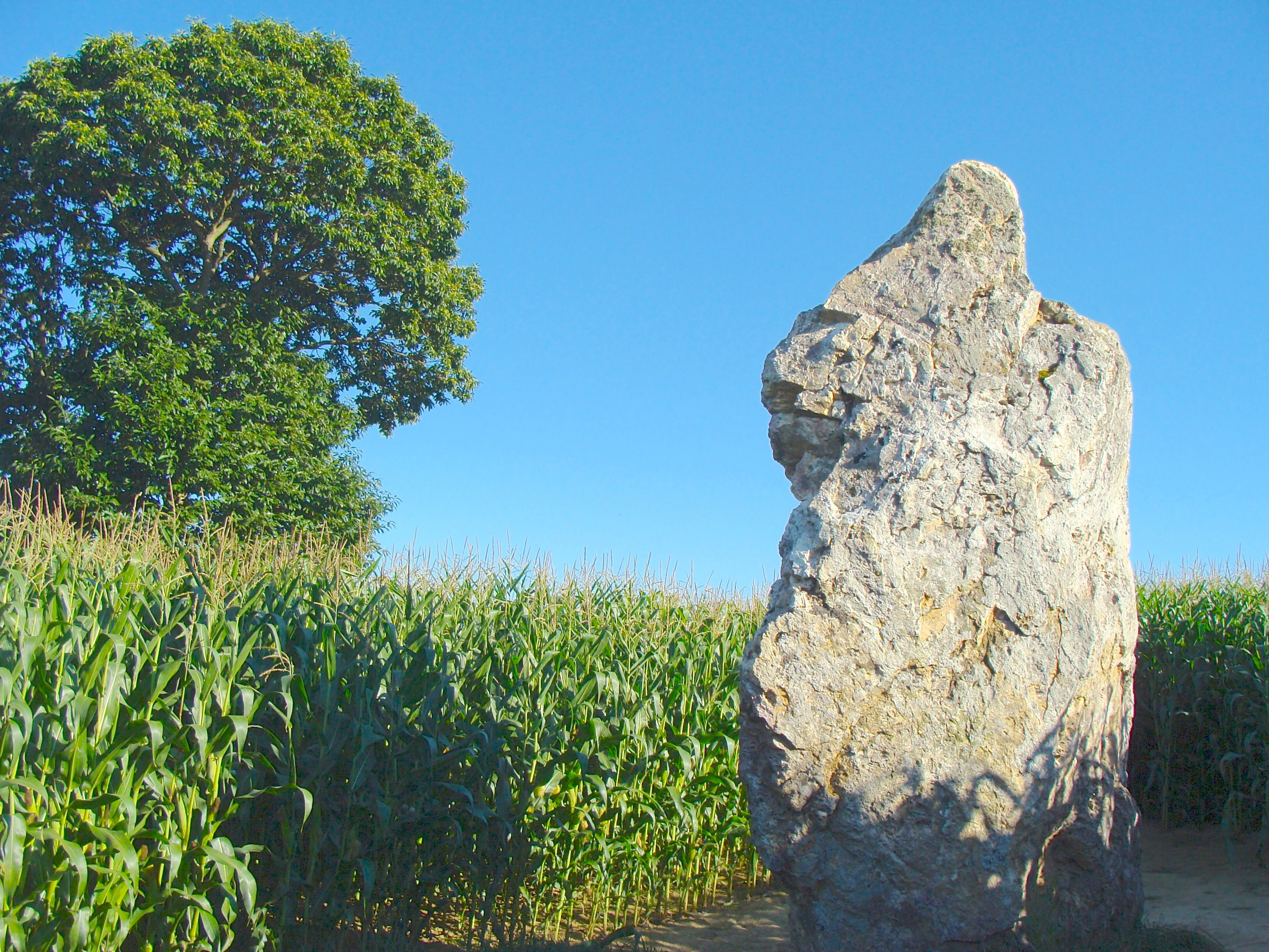 Menhir de La Pierre Longue, (Classement, 1967) .